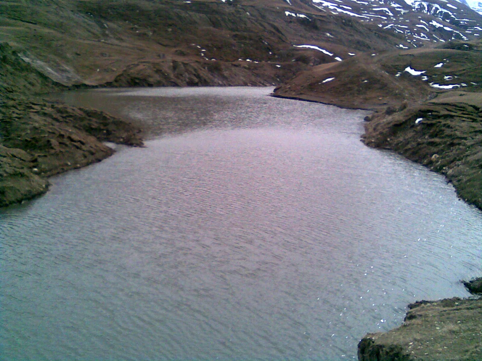 Cek kəndində İşğın gölü